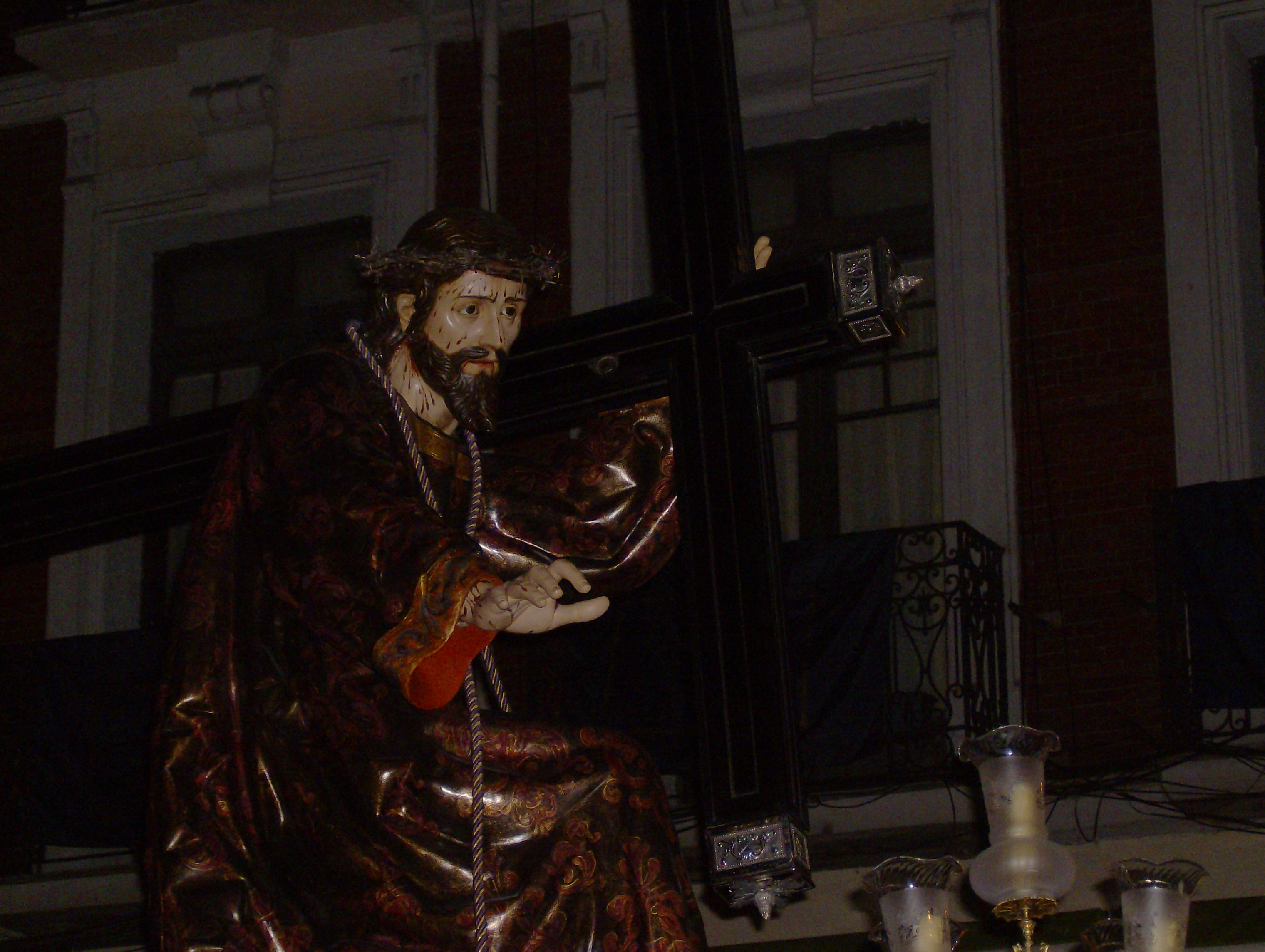 Nto. Padre Jesús Nazareno, Valladolid (Escuela Castellana)